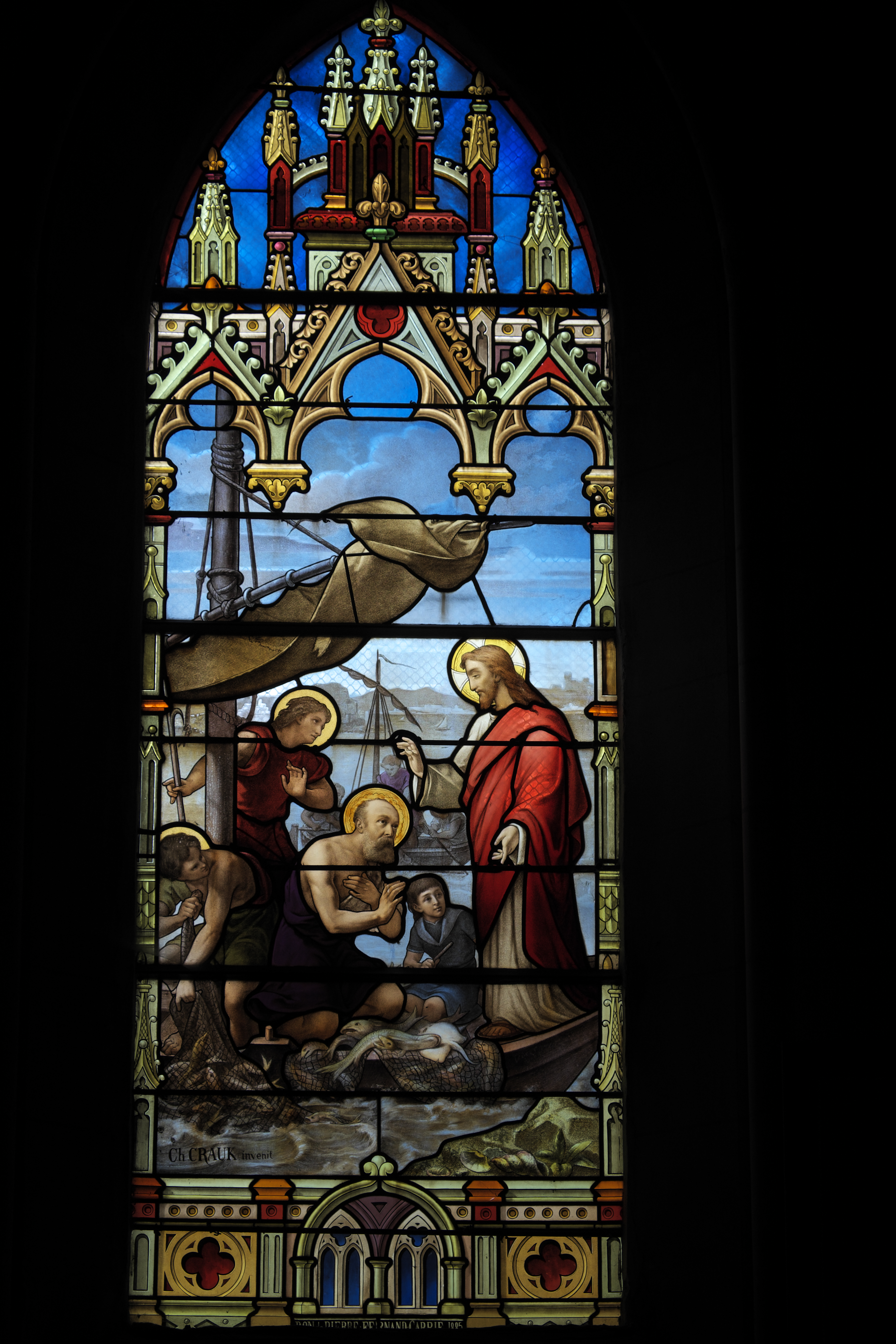 Katholische Pfarrkirche Saint-Aubin in Houlgate im Département Calvados (Basse-Normandie/Frankreich), Bleiglasfenster der Glasmalerei Lorin in Chartres; Signatur: Ch. CRAUK invenit, Darstellung: Wunderbarer Fischfang